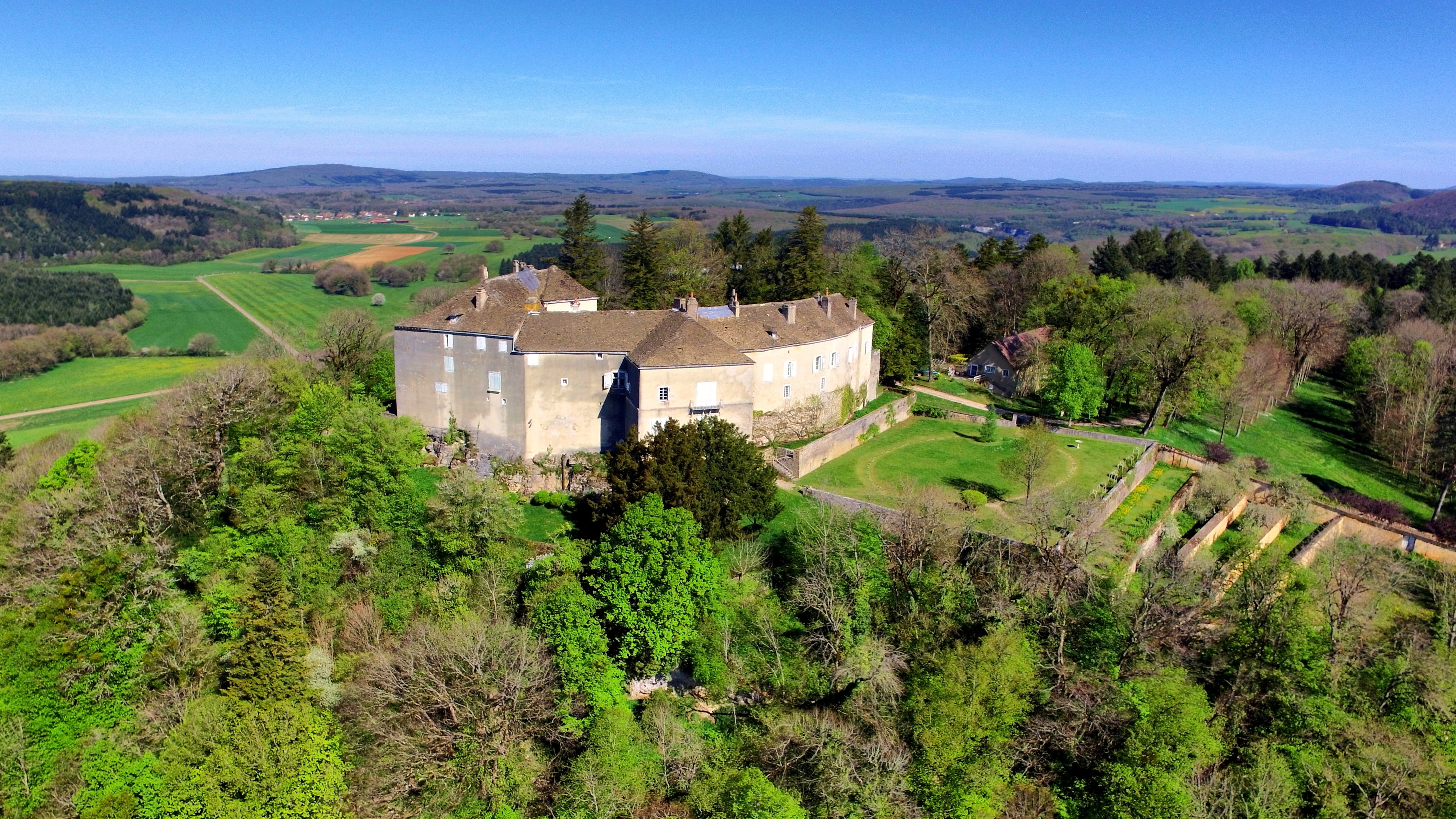 Château de Châtillon-sur-Lison .